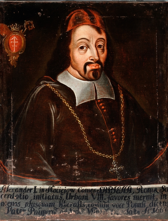 Беларуская (тарашкевіца): Партрэт Аляксандра Казімера Сапегі (Alaksandar Kazimier Sapieha) гербу «Ліс» (1624—1671), рымска-каталіцкага і дзяржаўнага дзеяча Вялікага Княства Літоўскага, рэфэрэндара вялікага літоўскага, біскупа жамойцкага і віленскага.